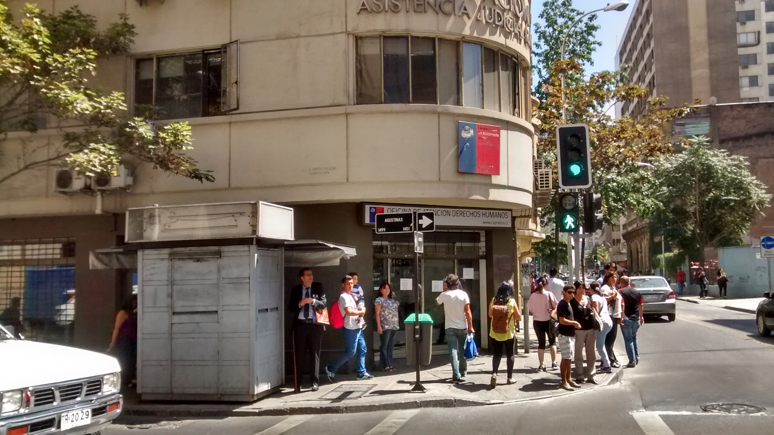 Oficinas de la Corporación de Asistencia Judicial en Santiago.